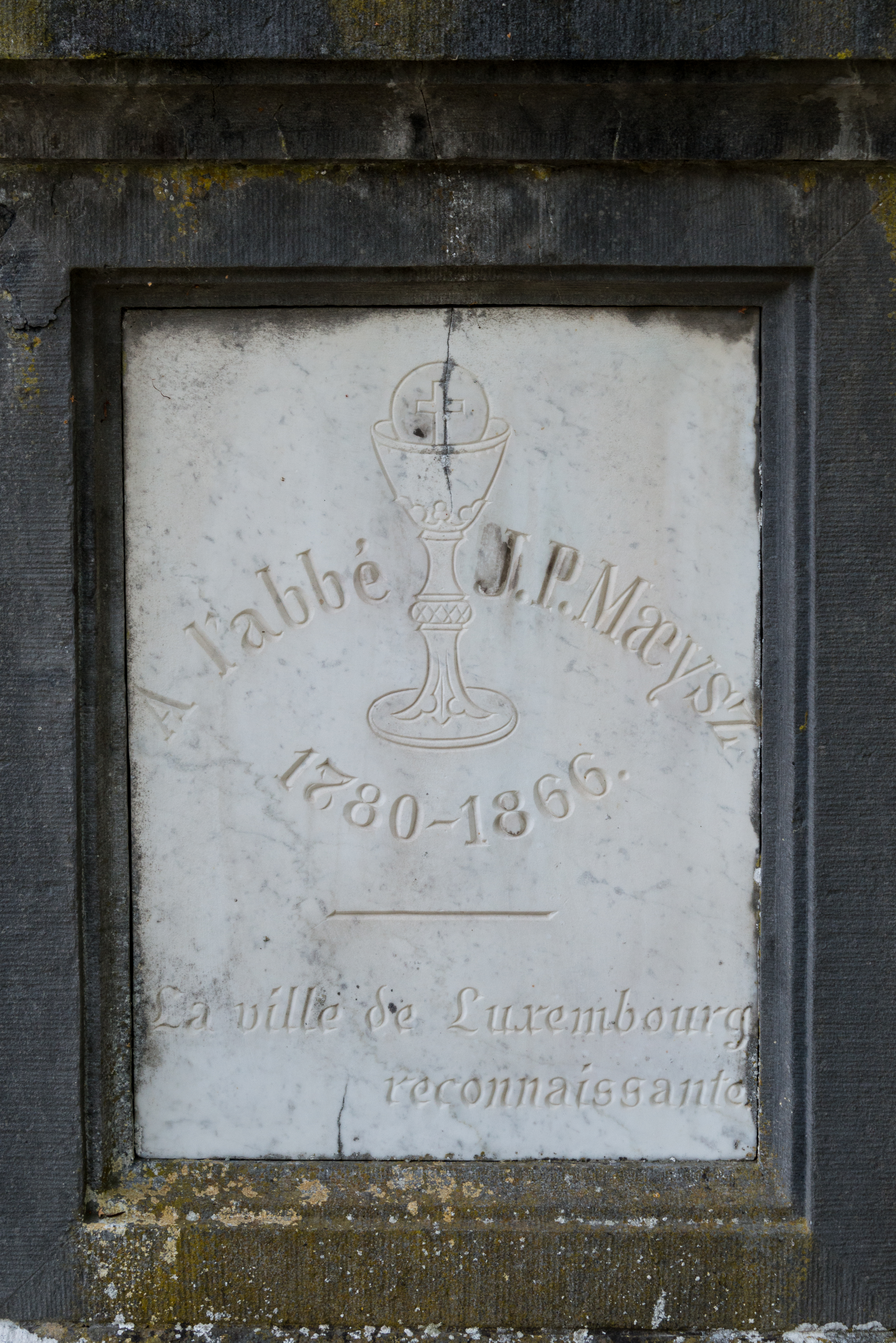 Graf Abbé Jean-Pierre Maecysz um Nikloskierfecht.